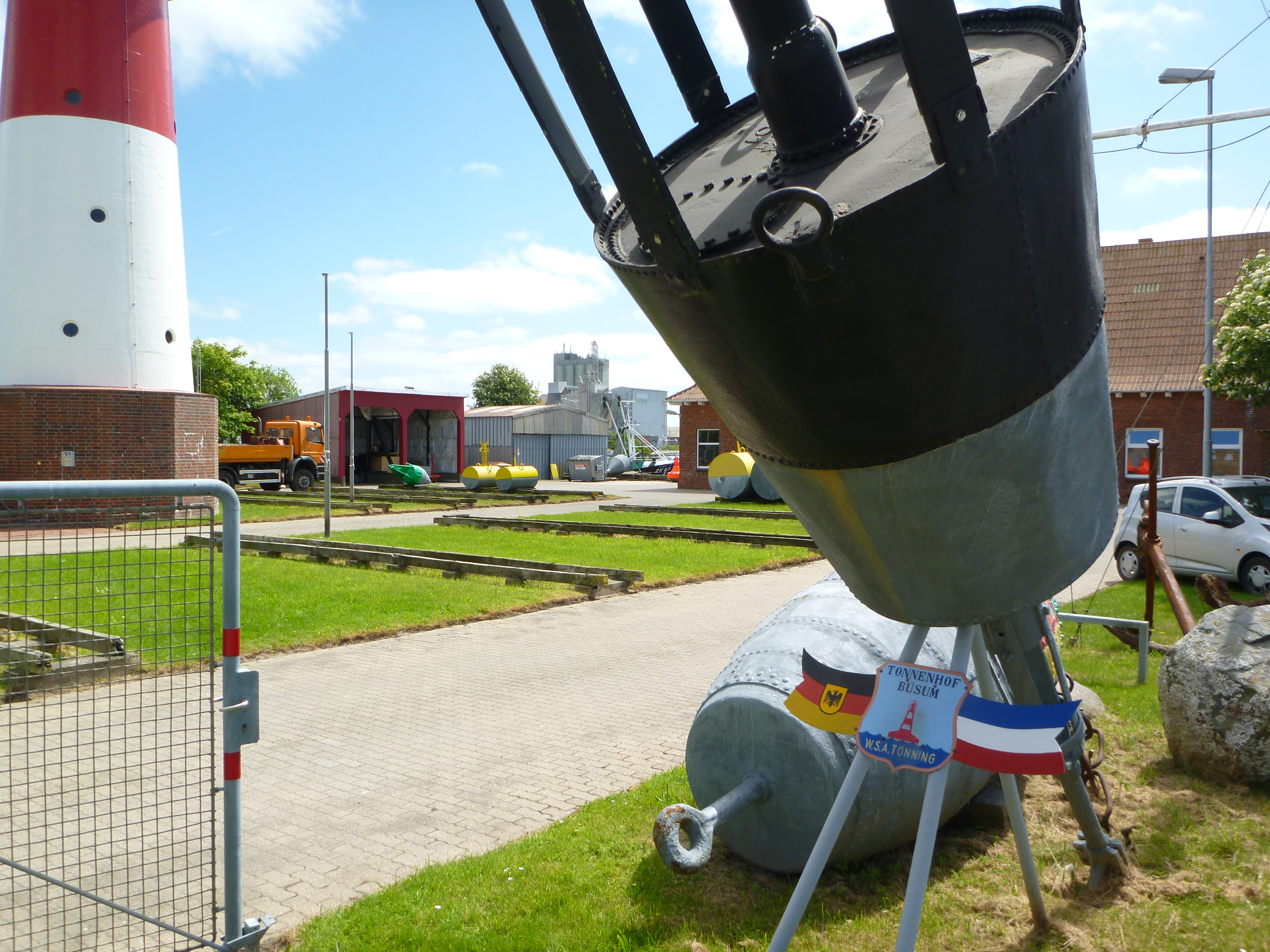 Tonnenhof des Wasser- und Schifffahrtsamt Tönning in Büsum